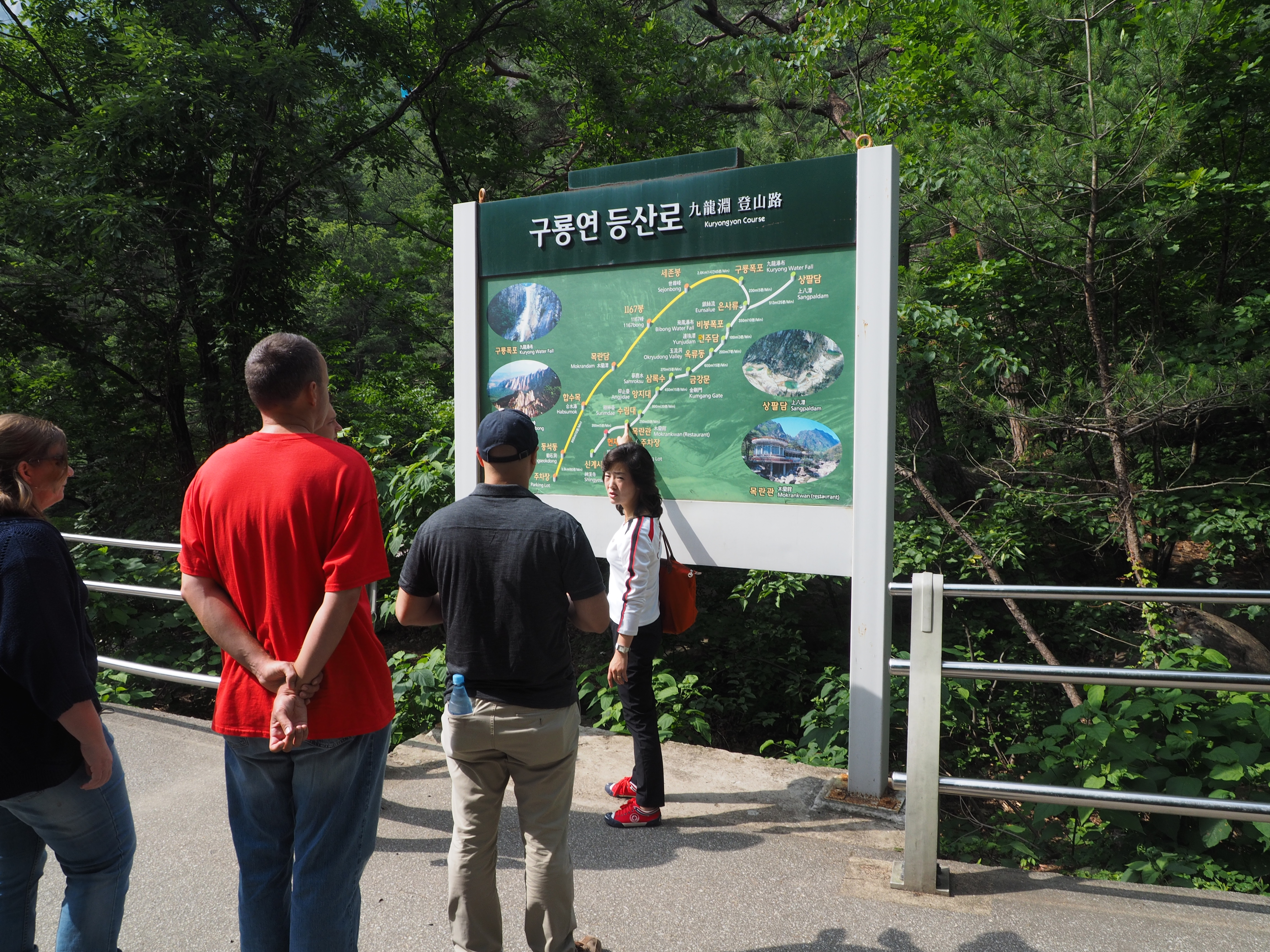 Kumgangsan National Park